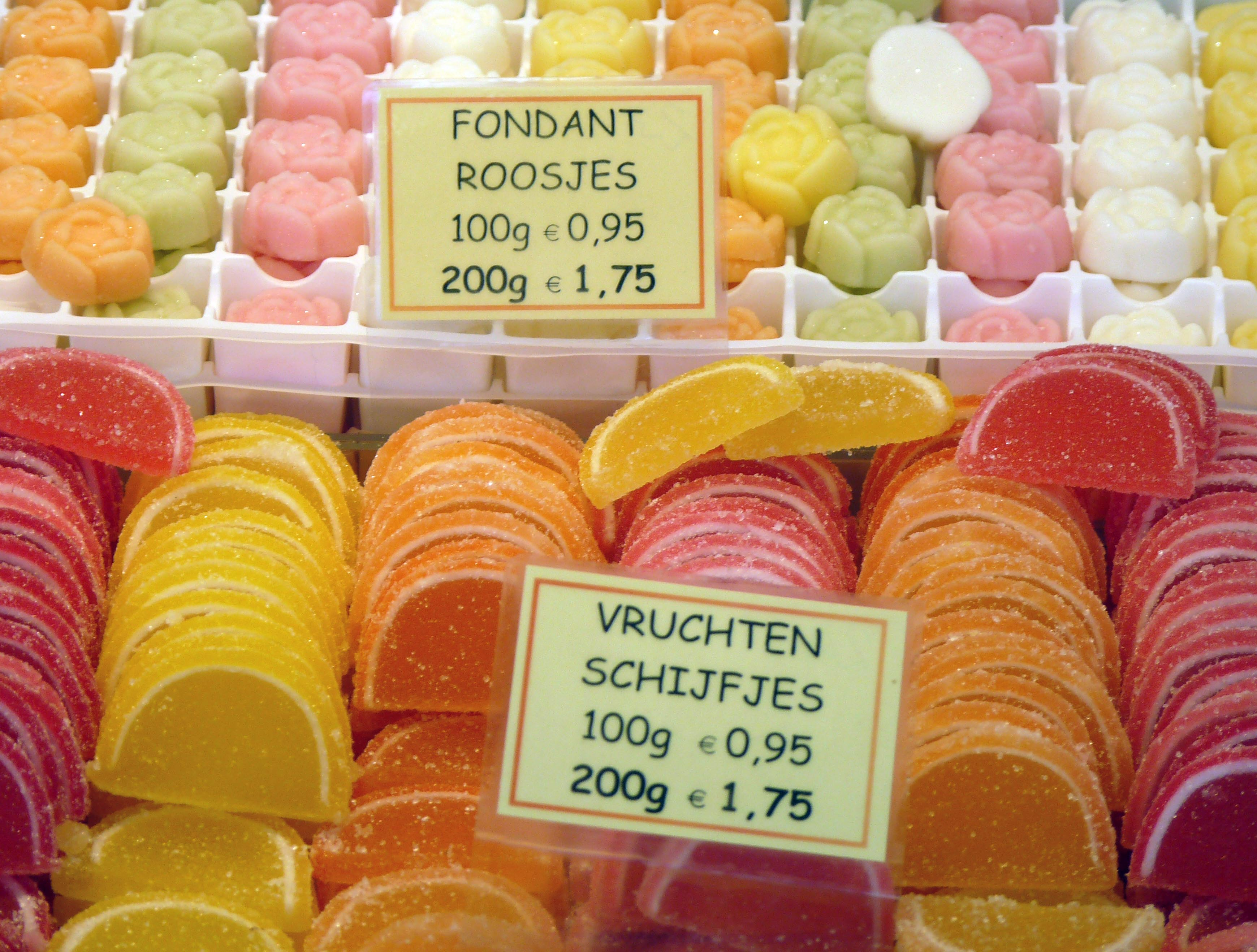 Delft Market 04